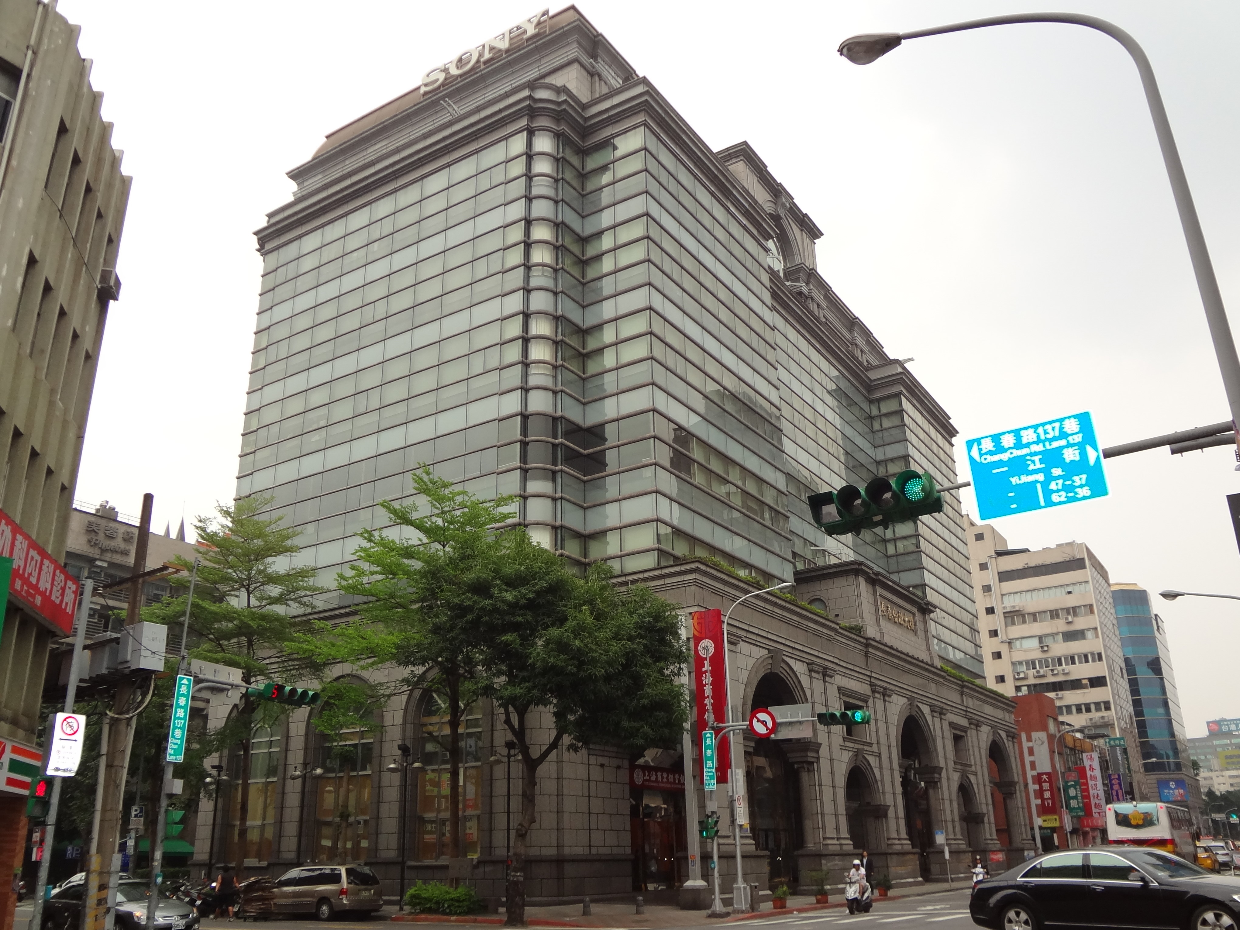 長春金融大樓，位於臺北市中山區長春路143、145號，為台灣索尼總部與上海商業儲蓄銀行松江分行所在地。